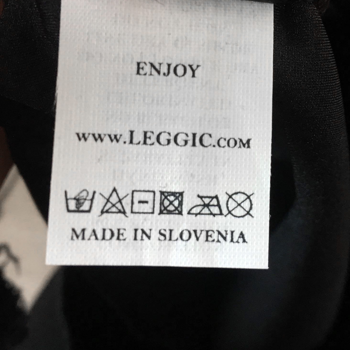 Tekstilna etiketa za vzdrževanje za pajkice narejenih iz poliamida.